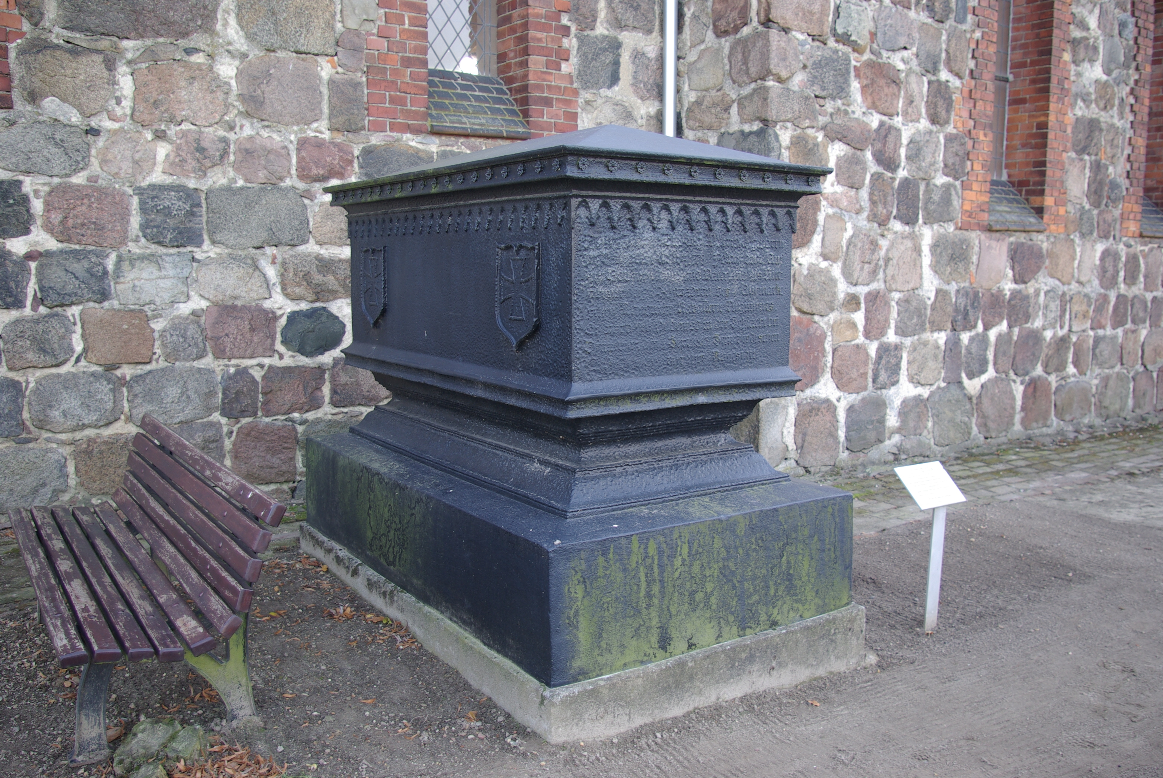 Niedergörsdorf in Brandenburg. Der Kenotaph steht neben der Kirche in Gölsdorf, es ist ein Entwurf von Schinkel. Der Kenotaph ist für den Rittmeister Franz Johann Ludwig Alberthal, der in der Schlacht von Dennewitz gefallen ist.